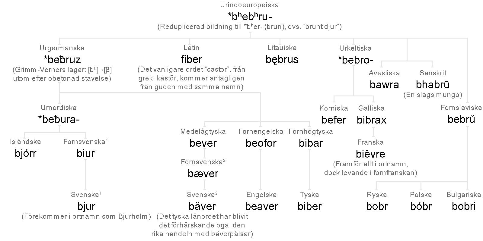 Etymologiskt schema för de svenska orden bäver och bjur. Skapad av uppladdaren och släppt under GNU/FDL. Typsnittet är Arial Unicode MS. Källor: Svensk etymologisk ordbok, SAOB, The American Heritage Dictionary samt University of Wales' English -- Proto-Celtic dictionary (PDF).